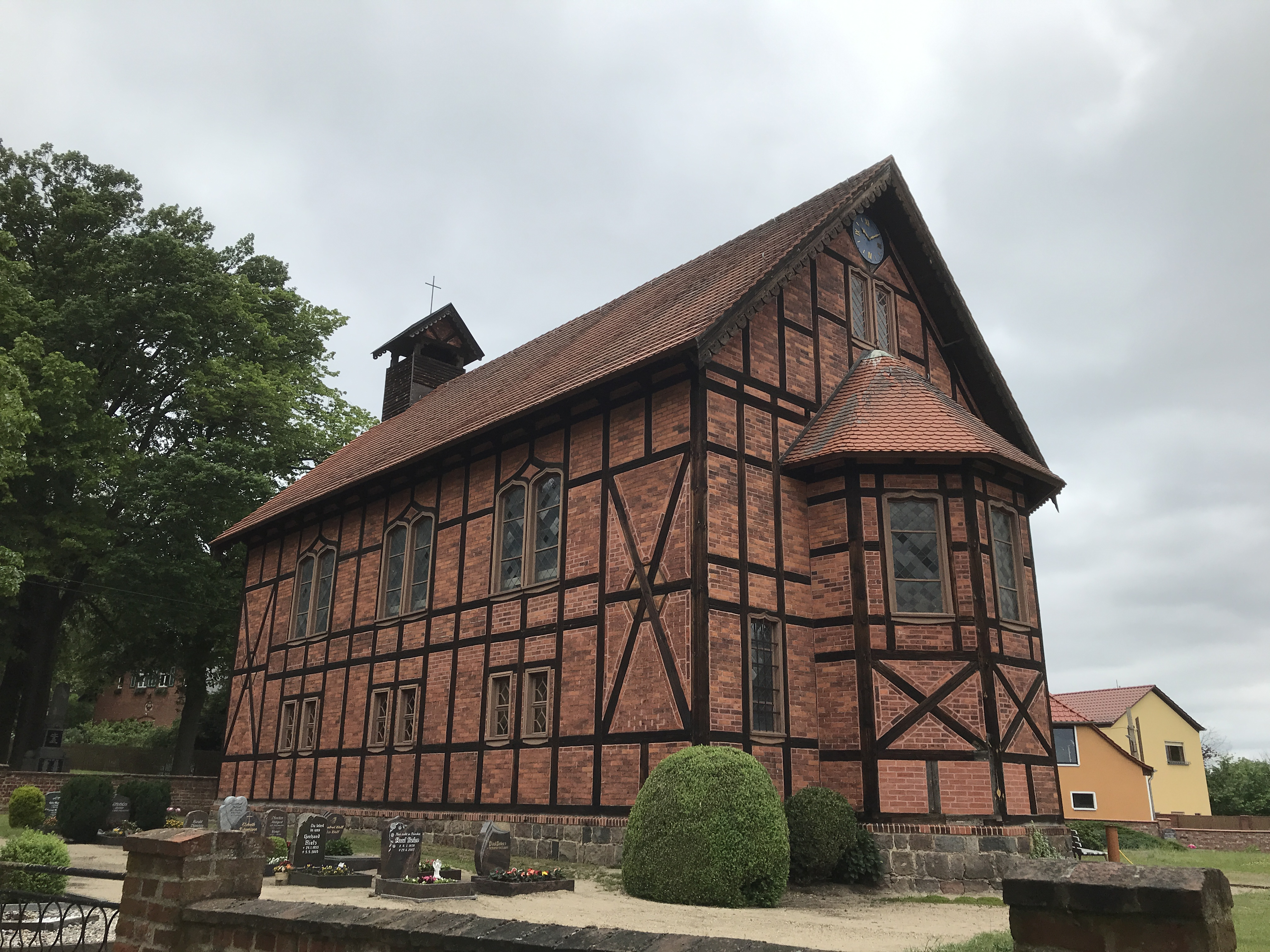 Die Dorfkirche Dippmannsdorf in Bad Belzig-Dippmannsdorf im Landkreis Potsdam-Mittelmark im Land Brandenburg ist eine Fachwerkkirche aus dem Jahr 1860. Sie geht auf einen Musterentwurf Friedrich August Stülers zurück.